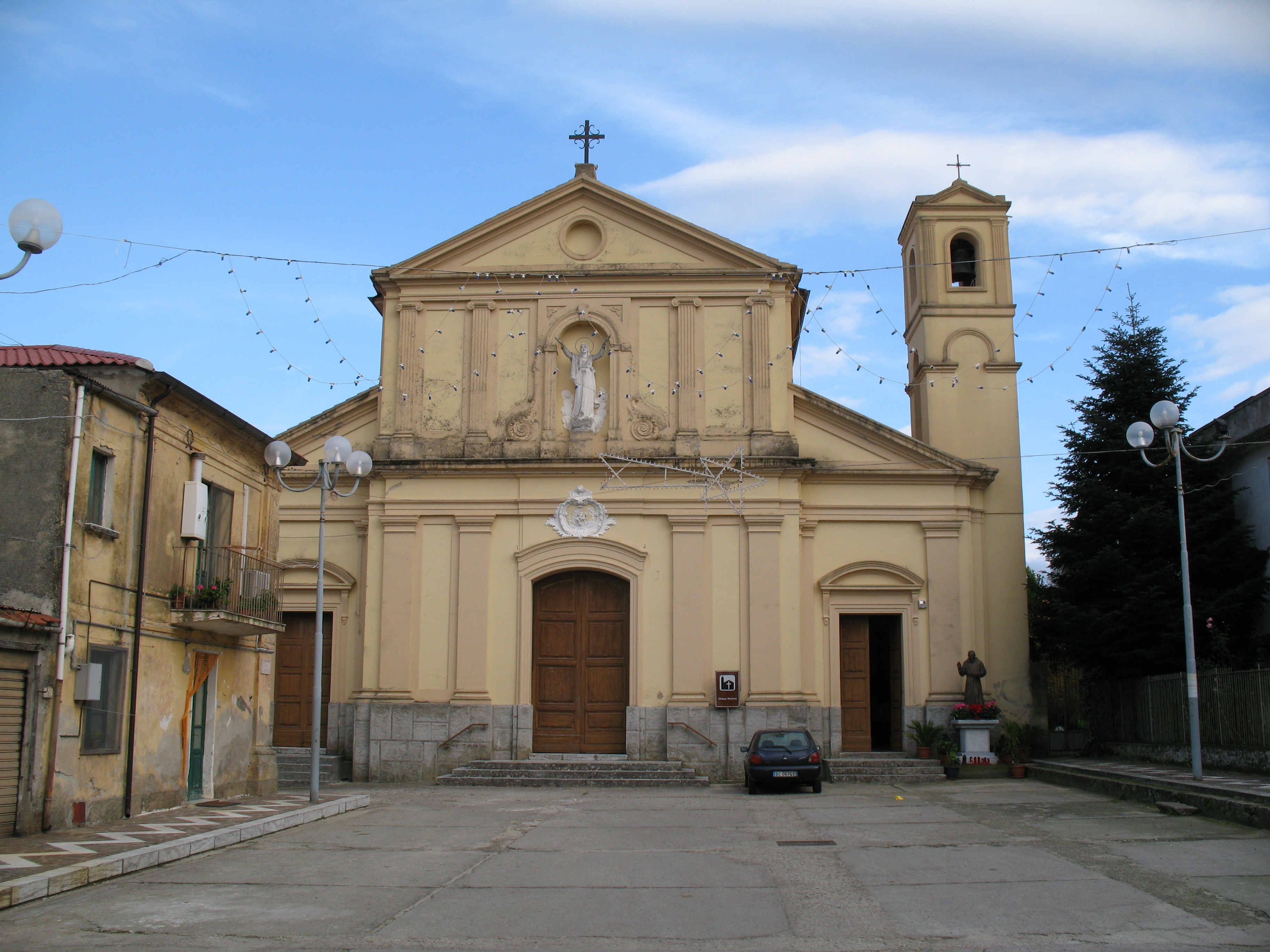 Terranova Sappo Minulio, chiesa matrice